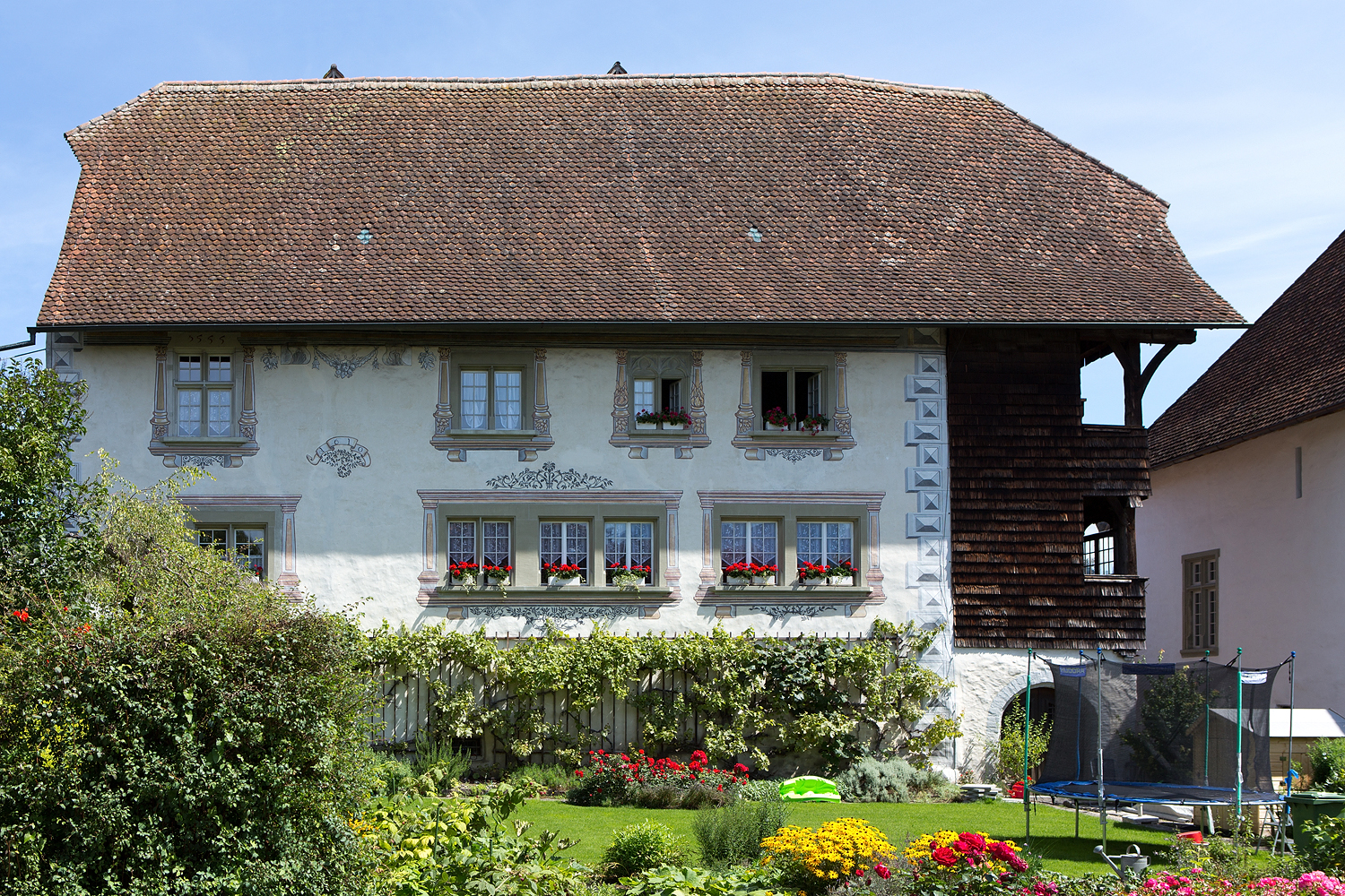 Das "kleinere" Höchhus in Steffisburg. Steht neben dem grossen Höchhus.